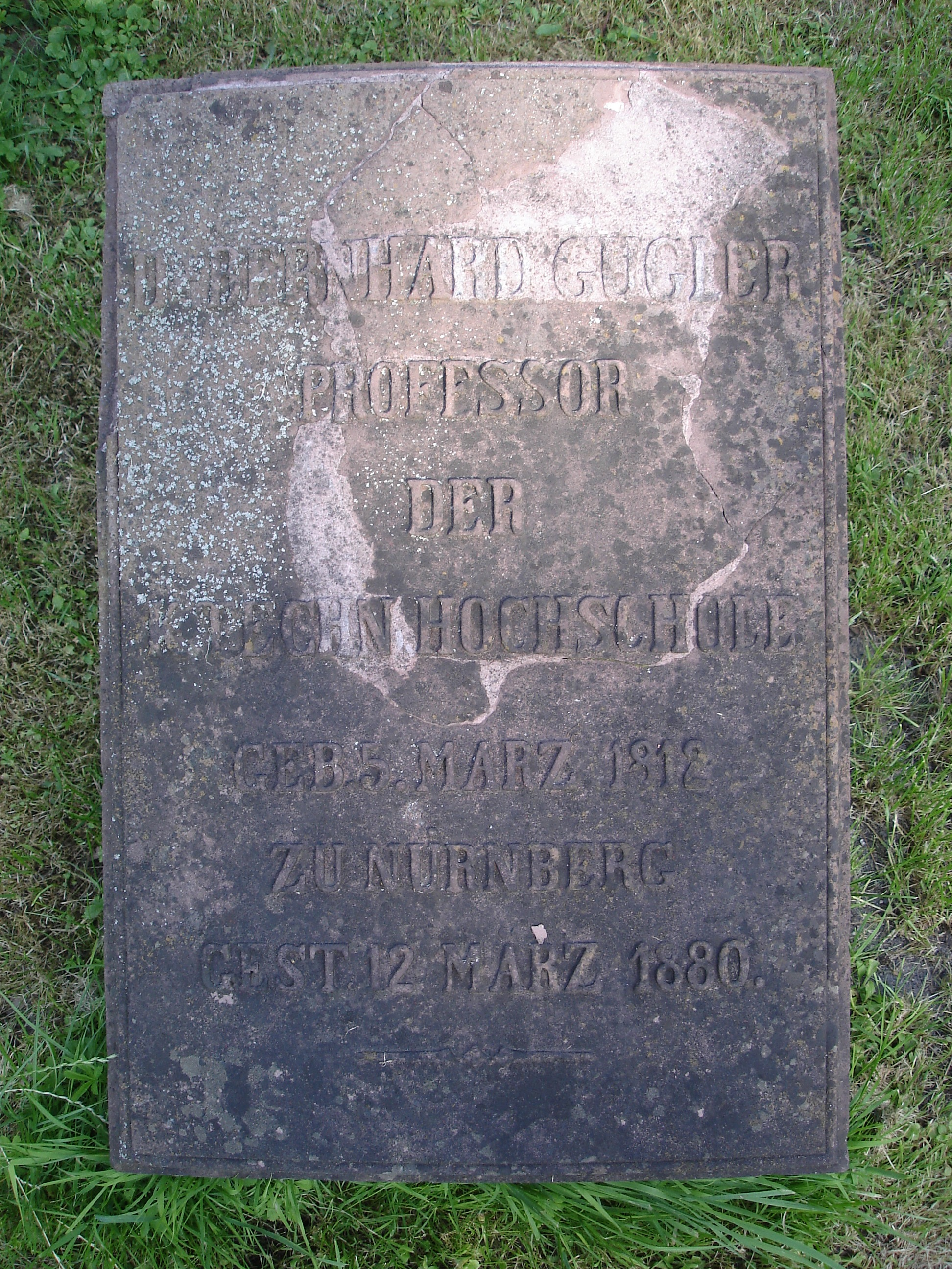 Grab von Bernhard Kugler in Stuttgart